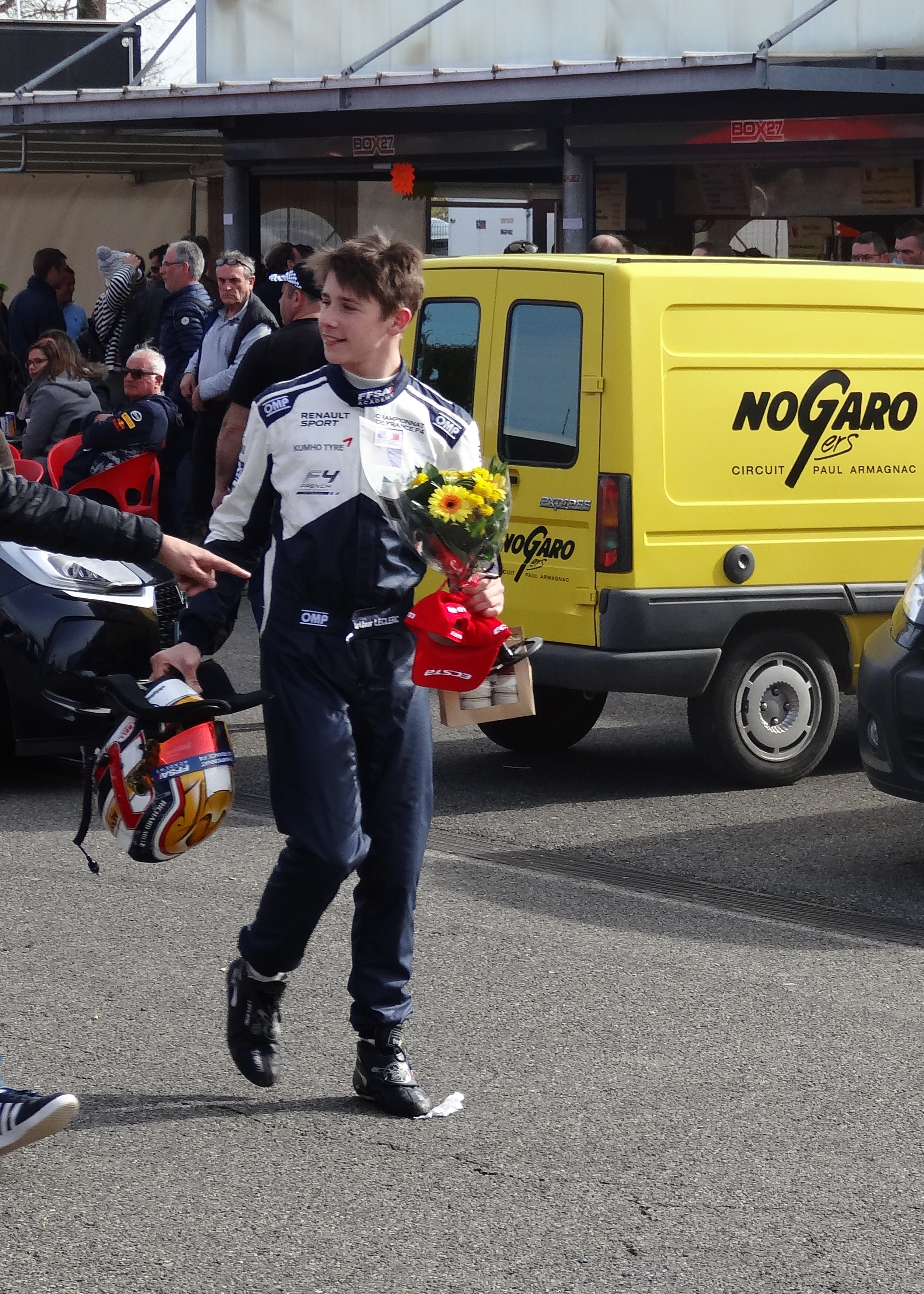 51e Coupes de Pâques (sport automobile), sur le Circuit Paul Armagnac à Nogaro (Gers) : F4 France.